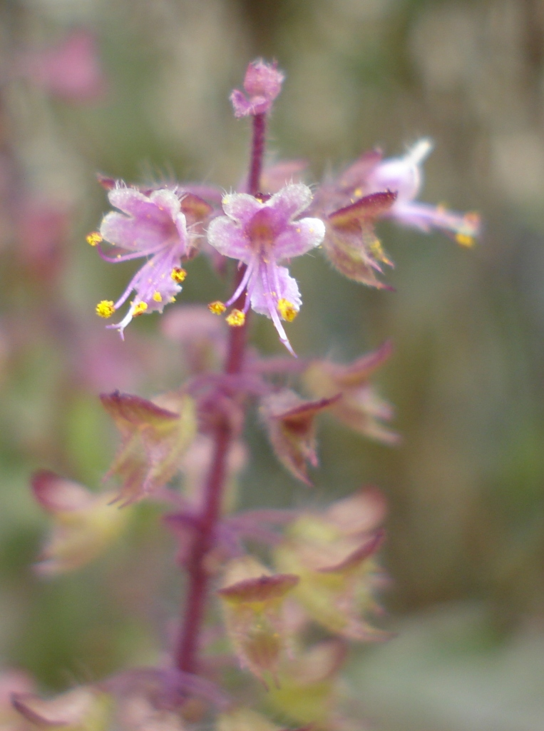 തുളസിപ്പൂവ്‌